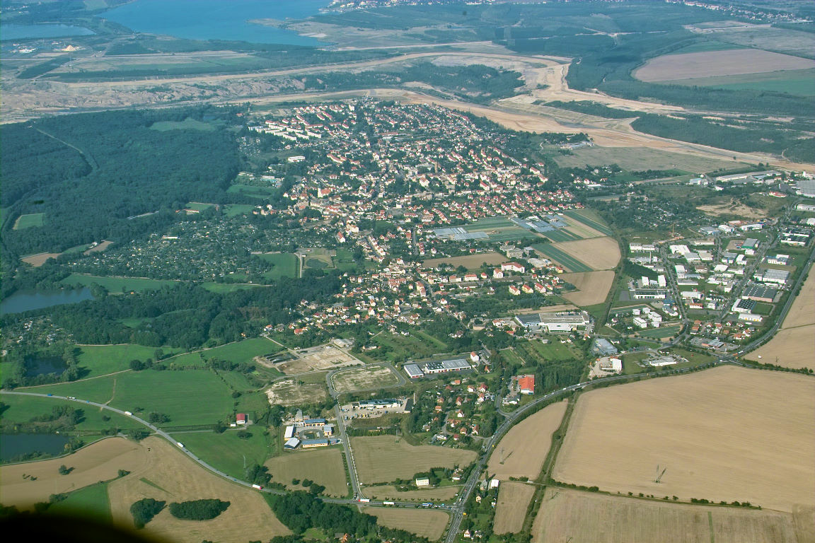 Luftbild der Stadt Zwenkau von Süden.Am oberen Bildrand Cospudener See und Elsterstausee.Der Zwenkauer See ist noch nicht geflutet